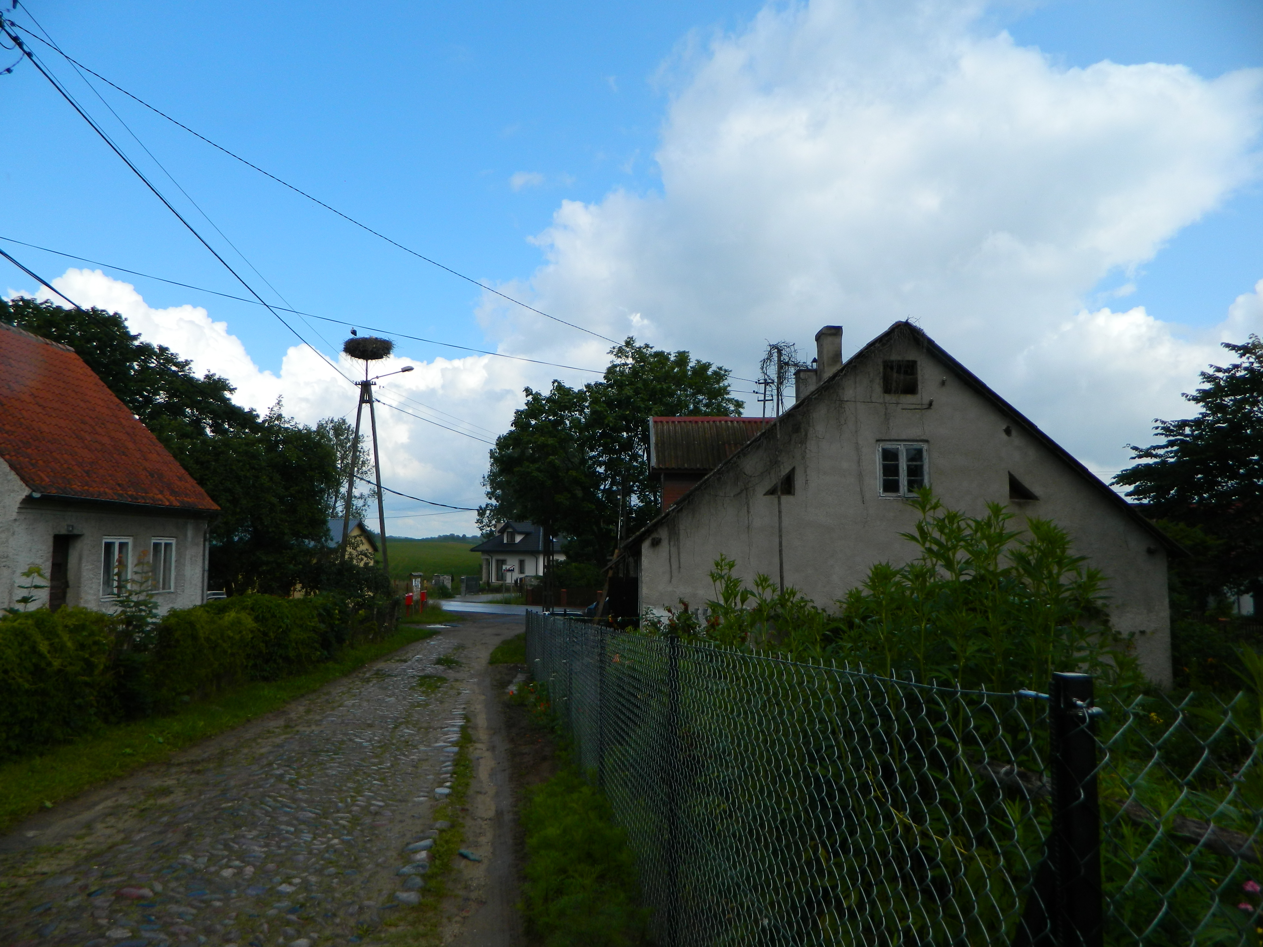 Bocianie gniazdo, Jęcznik - wjazd od strony Pasymia